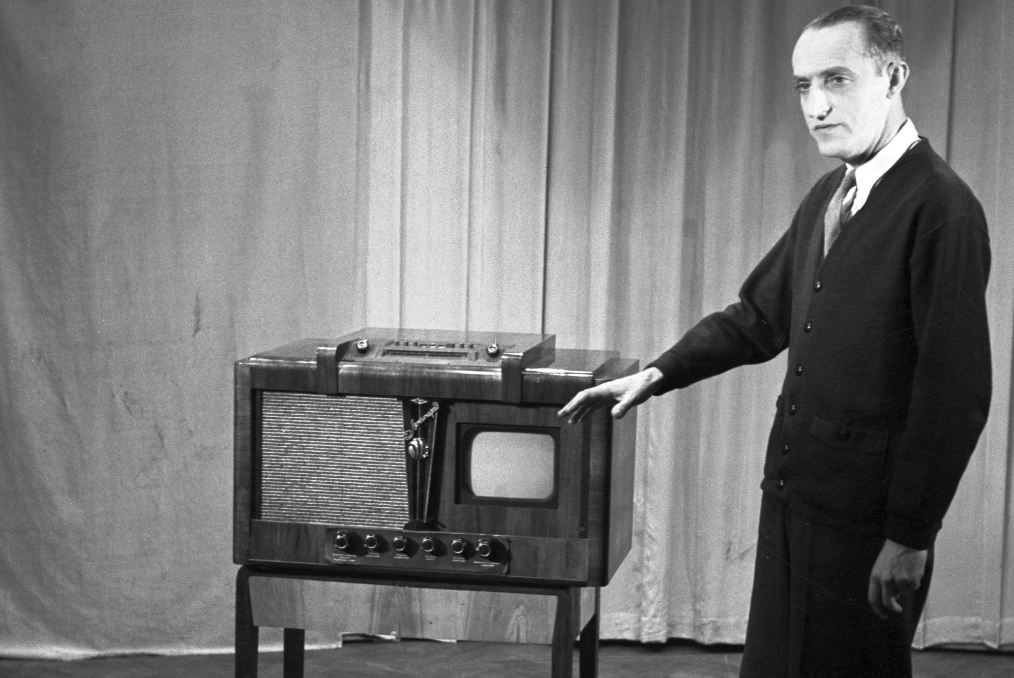 Instytut Łączności - Doświadczalna Stacja Telewizyjna, Warszawa.